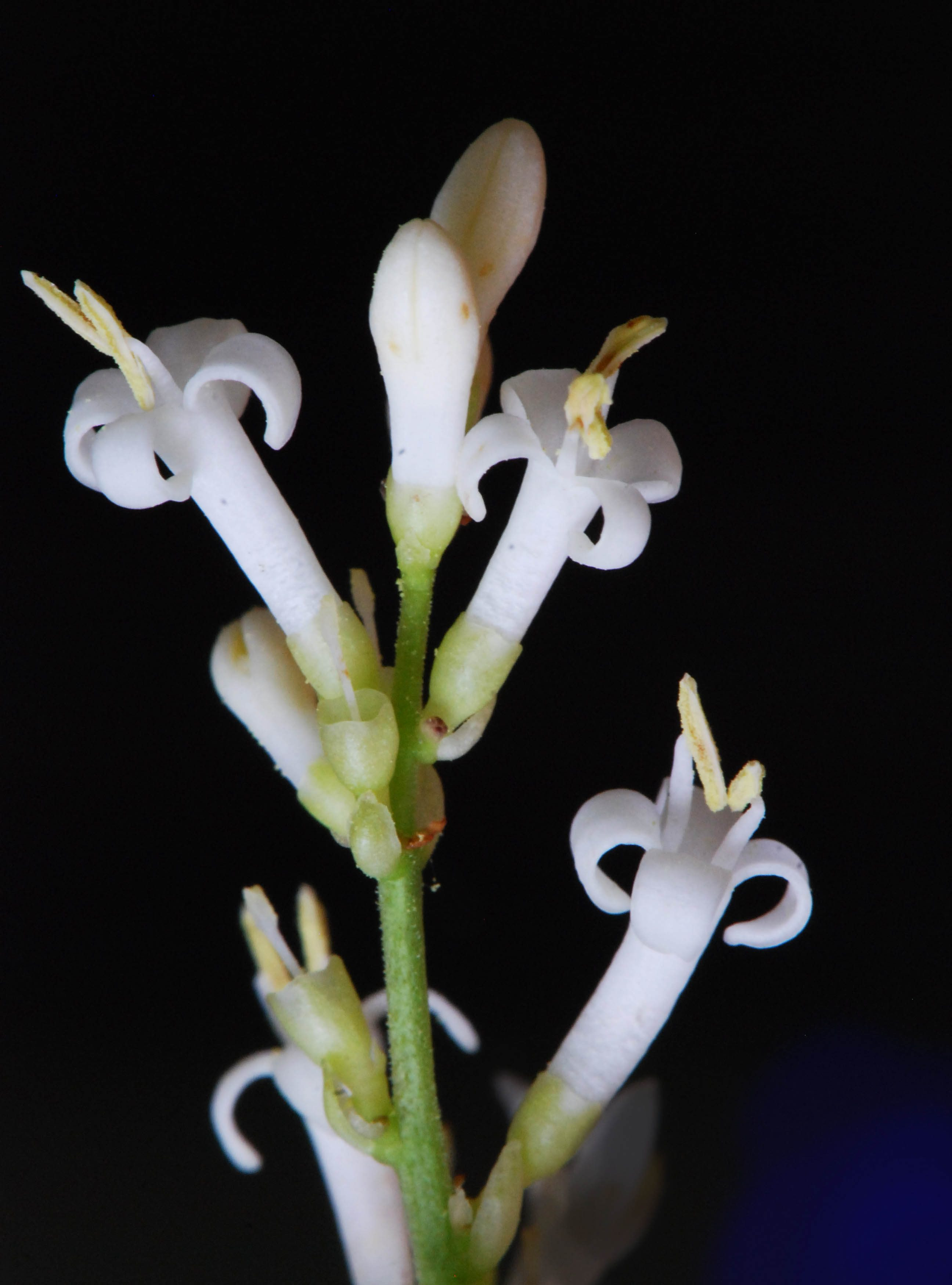 Ligustrum vulgare, troène, fleurs, Paris